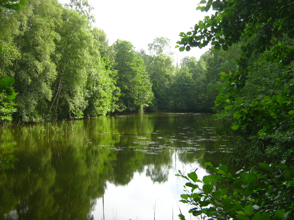 Der wenige hundert Meter lange Rest des abgebrochenen Projektes eines Küstenkanals vom Breitling zum Saaler Bodden im Wald der Rostocker Heide südlich des Dorfes Torfbrücke.